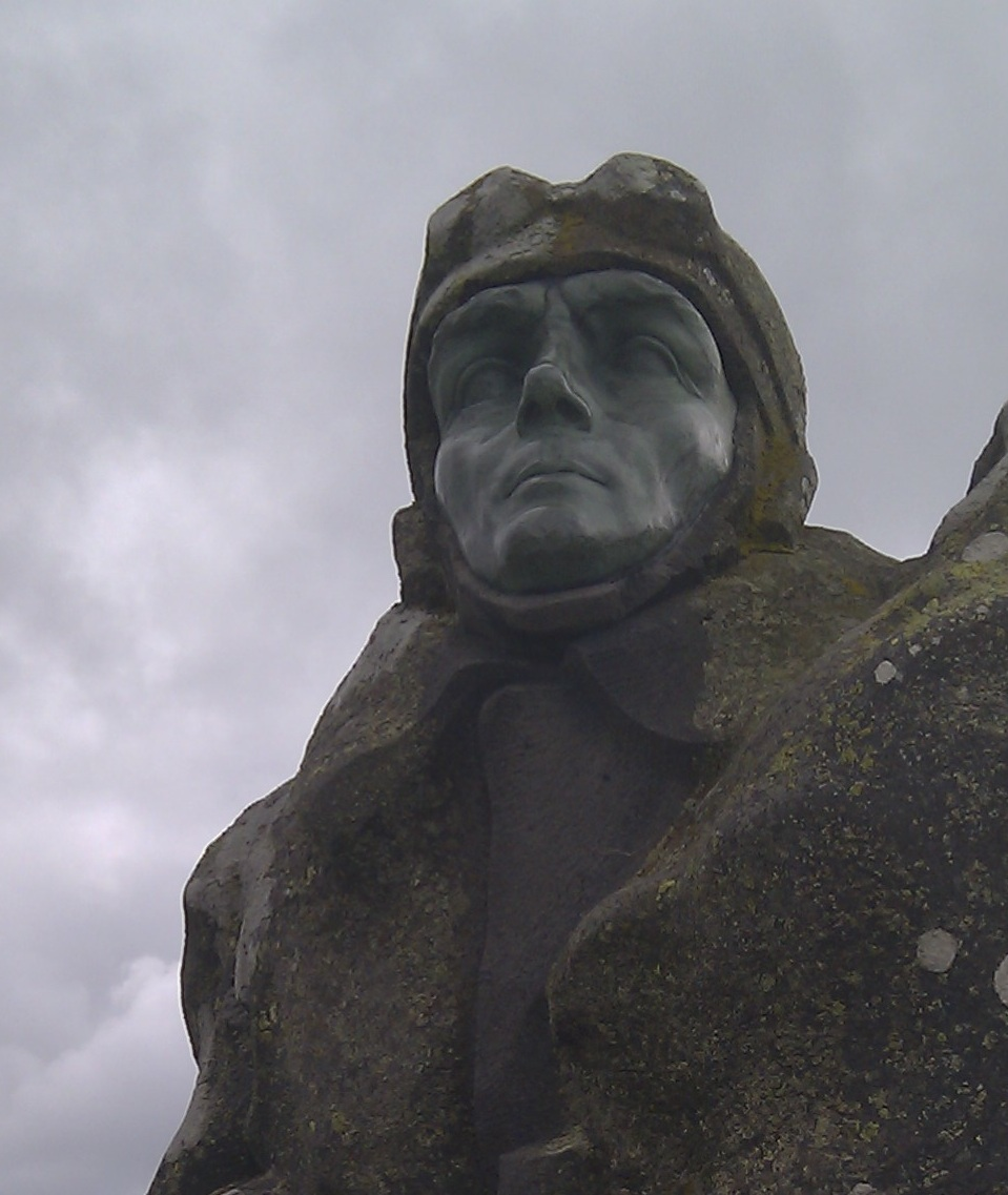 Stèle de 1923 en hommage à Eugène Renaux au sommet du Puy de Dôme